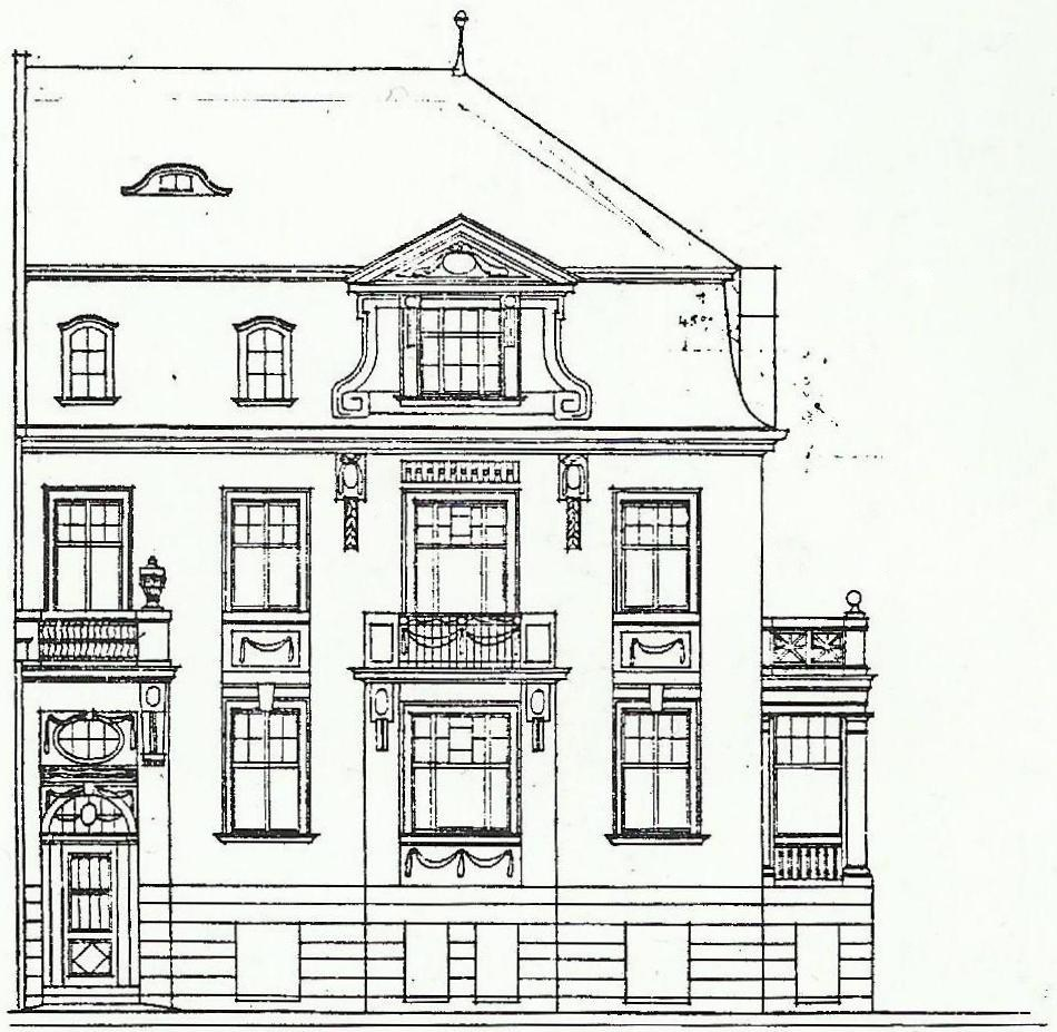 Halbvilla von Schloezer, Schaumburg-Lippe-Straße 7, Bonn-Südstadt: Aufriss der Vorderseite nach Kayser & von Großheim 1905